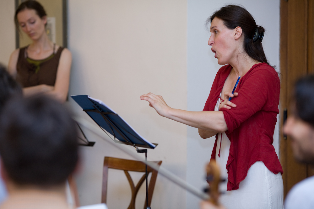 Claire Lefilliâtre během zkoušky na koncert Římská slavnost, Arte dei Suonatori a Collegium Marianum, Praha, festival Letní slavnosti staré hudby.